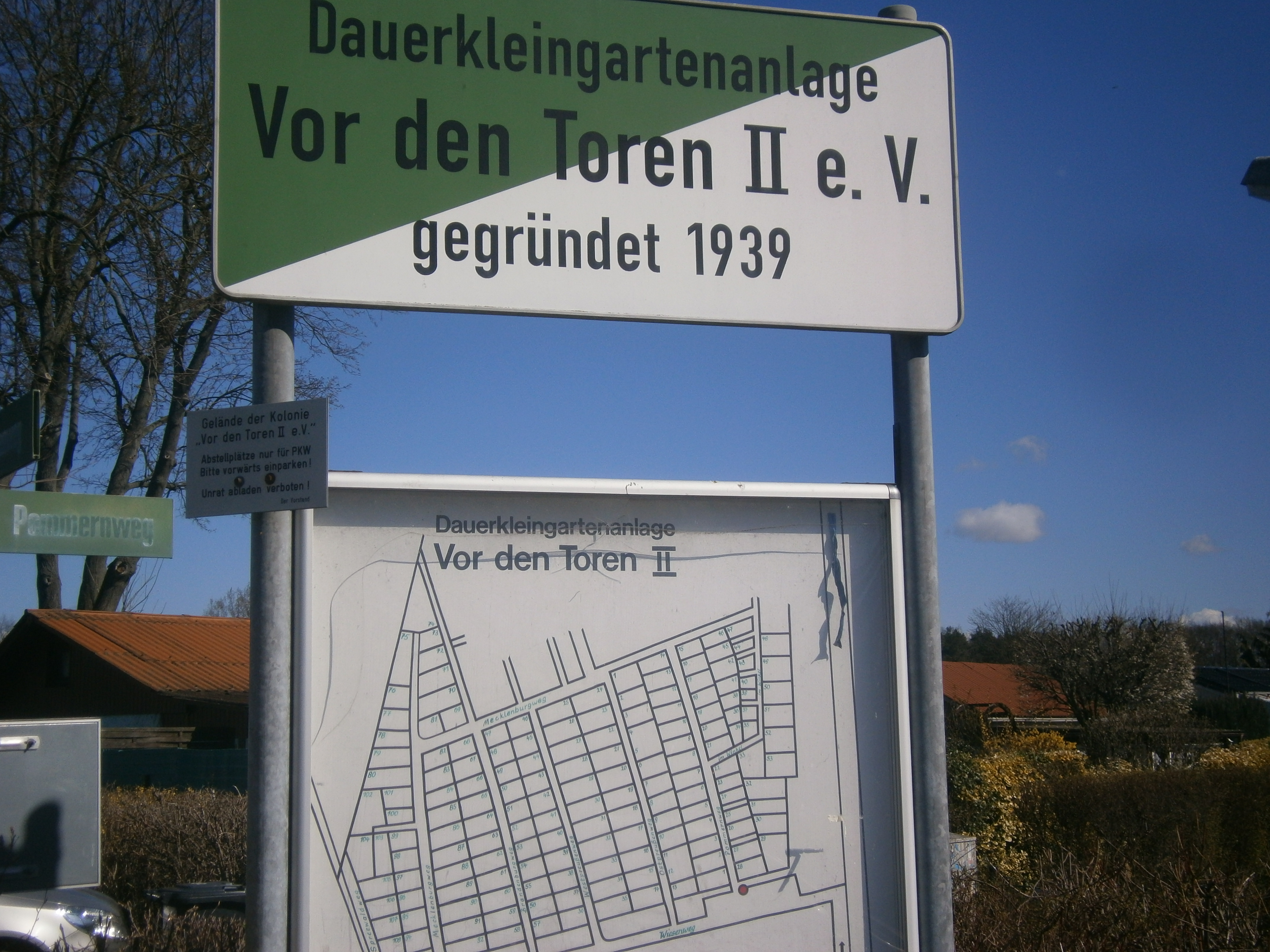 Die KGA Vor den Toren II ist eine Garten- und Siedlerkolonie in Berlin-Tegel, Bezirk Reinickendorf, auf den Mäckeritzwiesen. Hier der Pommernweg in der Kolonie.